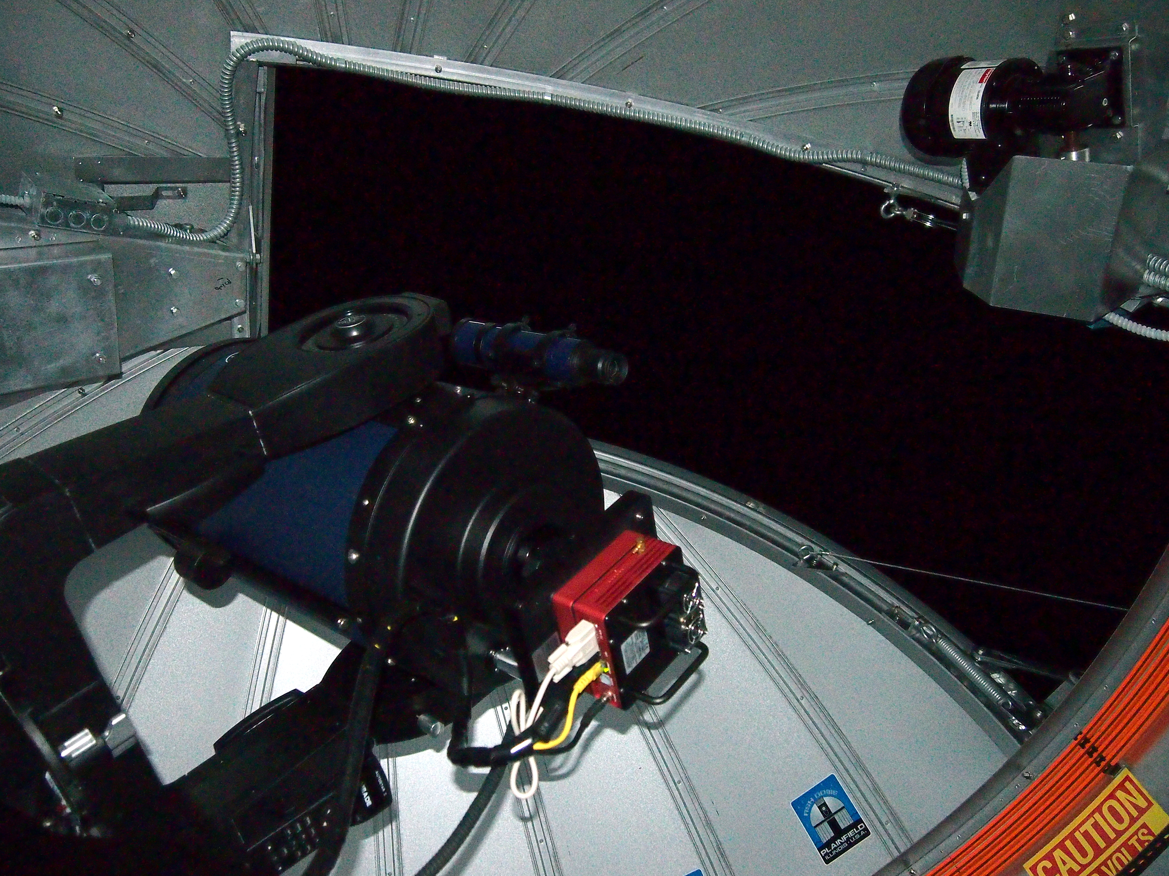 Telescopio MEADE y cámara CCD del Observatorio Astronómico del CURE